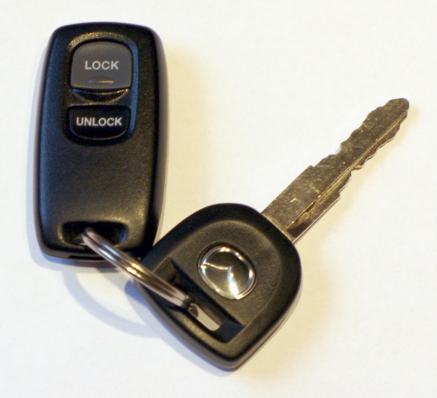 Funkfernbedienung Mazda3